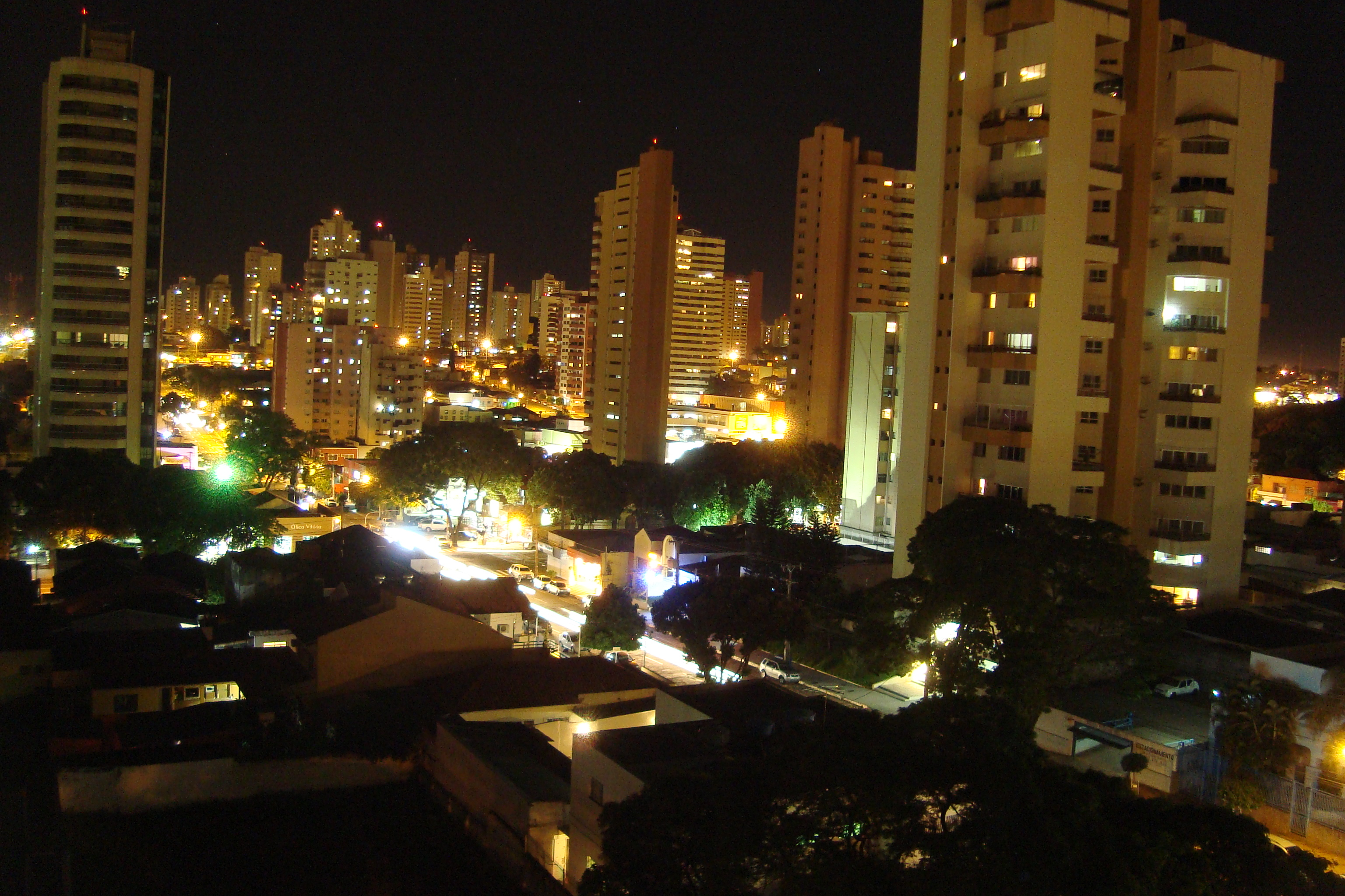 Vista noturna da cidade de Campo Grande, Mato Grosso do Sul